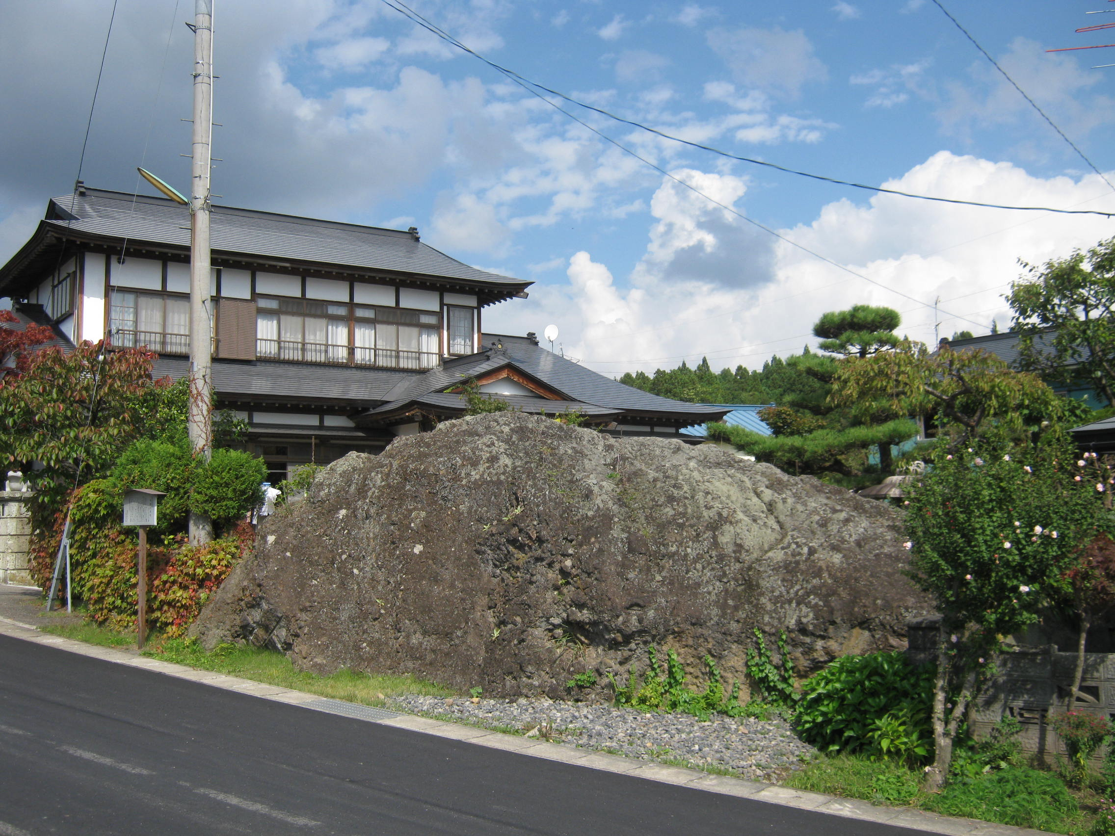 見祢の大石